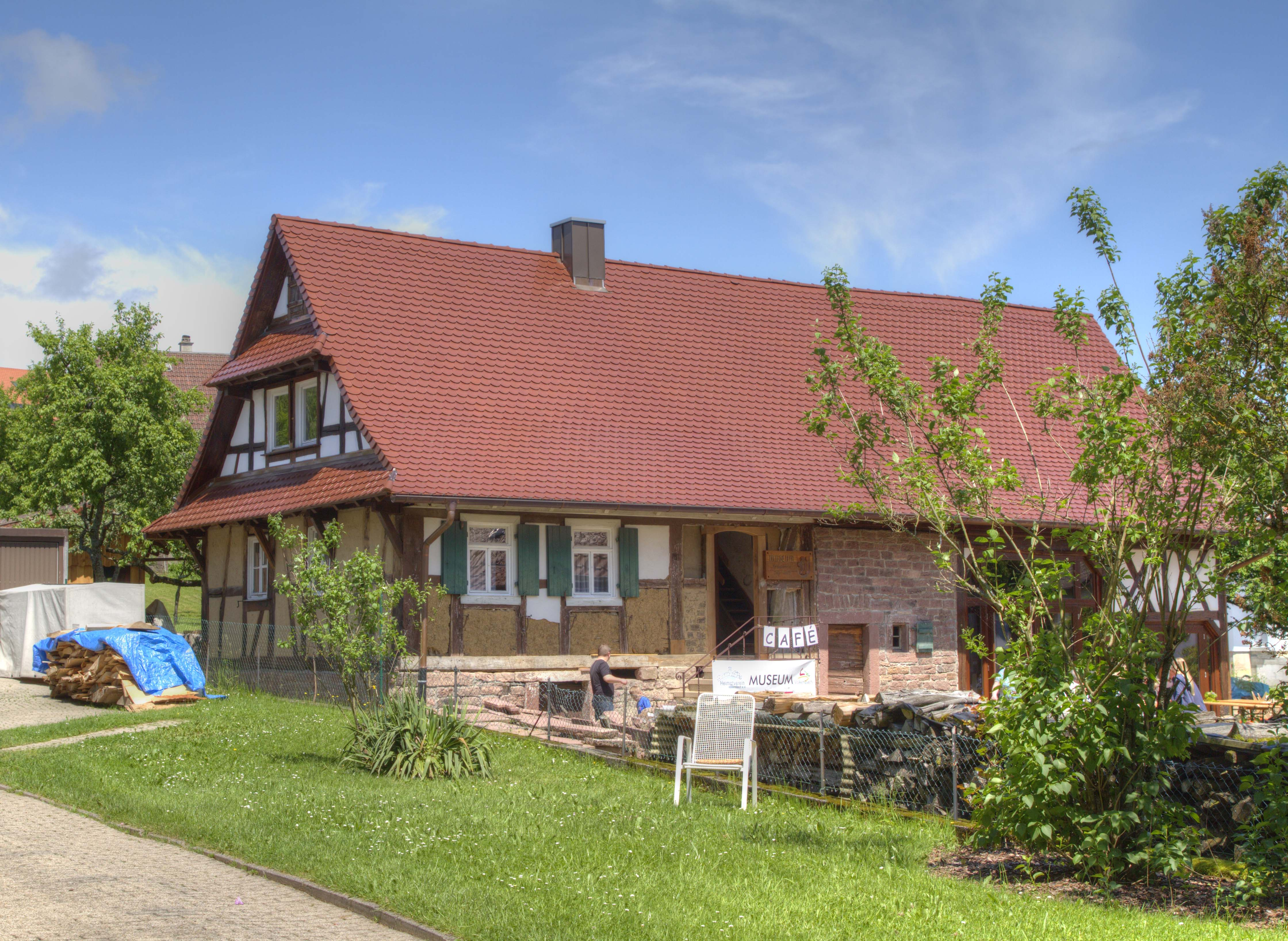 Ein Fachwerkhaus, aus dem Malscher Teilort Völkersbach. Das Haus beinhaltet ein Heimatmuseum, eine Schneiderei.